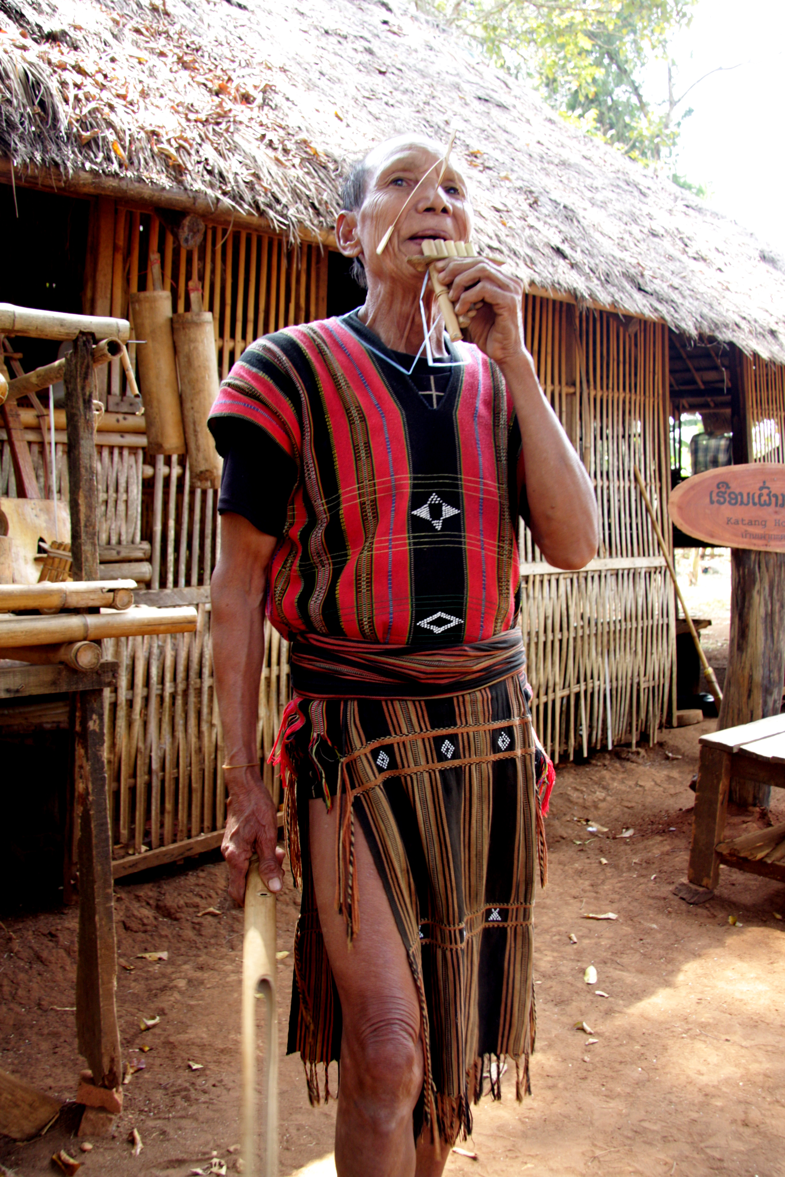 Laos sud, sekong, ethnie katang